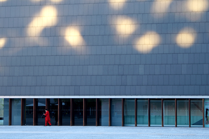 baluarte II